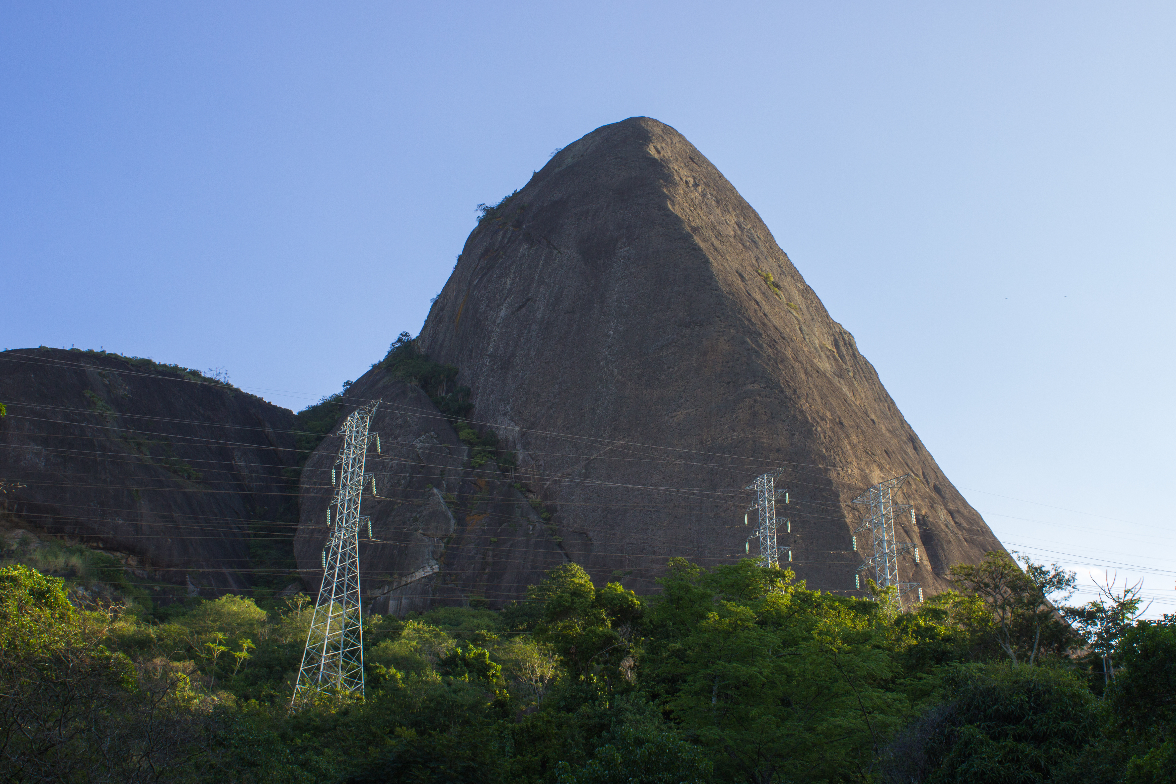 Pedra do Andaraí, como vista da Reserva Florestal do Grajaú. Rio de Janeiro, RJ, Brasil